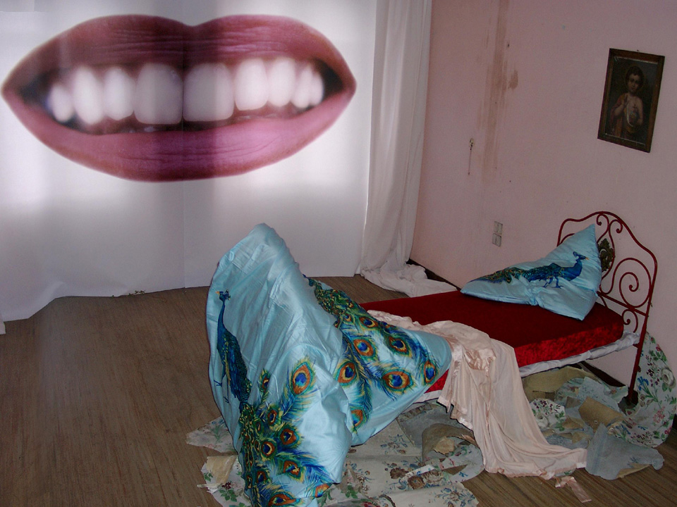 Birgit Kahle Rauminstallation Isola Bella 'Tabula Rasa' 2008 Birgit Kahle (1957–) DescriptionGerman artistDate of birth 1957 Location of birth Cologne Work period1980-Work location Germany, ItalyAuthority control : Q28736363 VIAF: 10472521 ISNI: 0000 0001 0777 1498 ULAN: 500115319 LCCN: nr96017659 GND: 171939824 WorldCat creator QS:P170,Q28736363